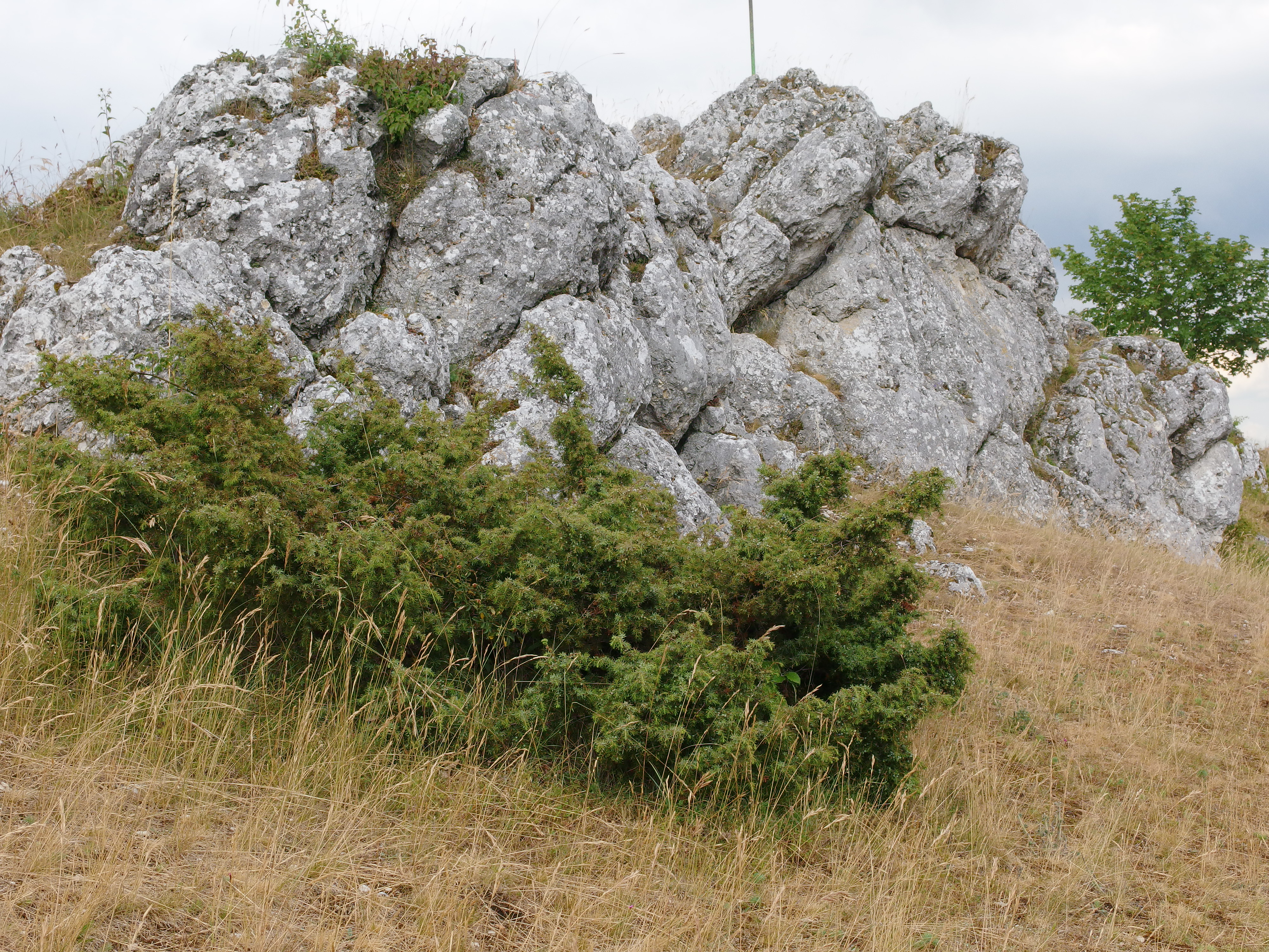 Landschaftsschutzgebiet „Schutz von Landschaftsteilen im Bereich der Stadt Harburg und der Gemarkung Großsorheim“ (LSG-00253.01): Harburg-Großsorheim, typische Trockenrasenfläche mit einzelnen kleinwüchsigen Wacholdern